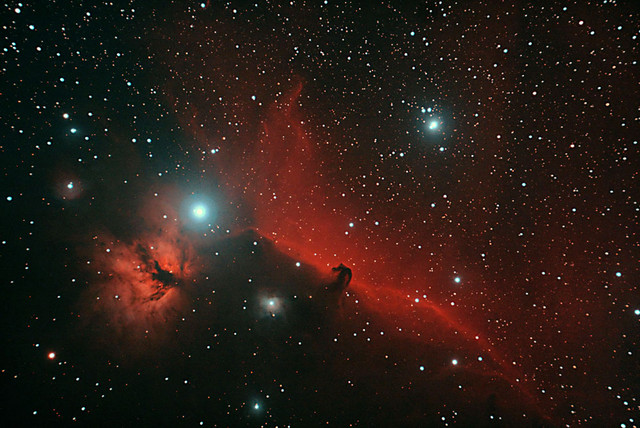 Dzéta Ori körüli köd a Lófej-köddel (Ludányhalászi)